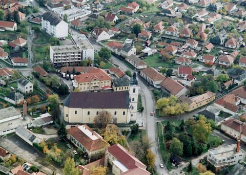 Jászárokszállás, Hungary, aerialphotography, Szentháromság római katolikus templom